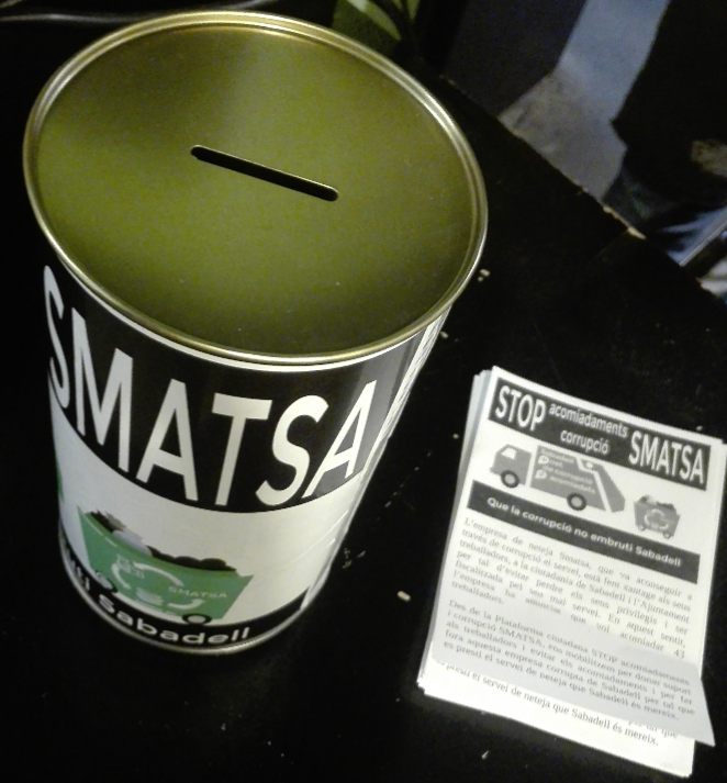 Guardiola contra la corrupció i els acomiadaments aplicats per la directiva de SMATSA, situada al Casal Can Capablanca de Sabadell.